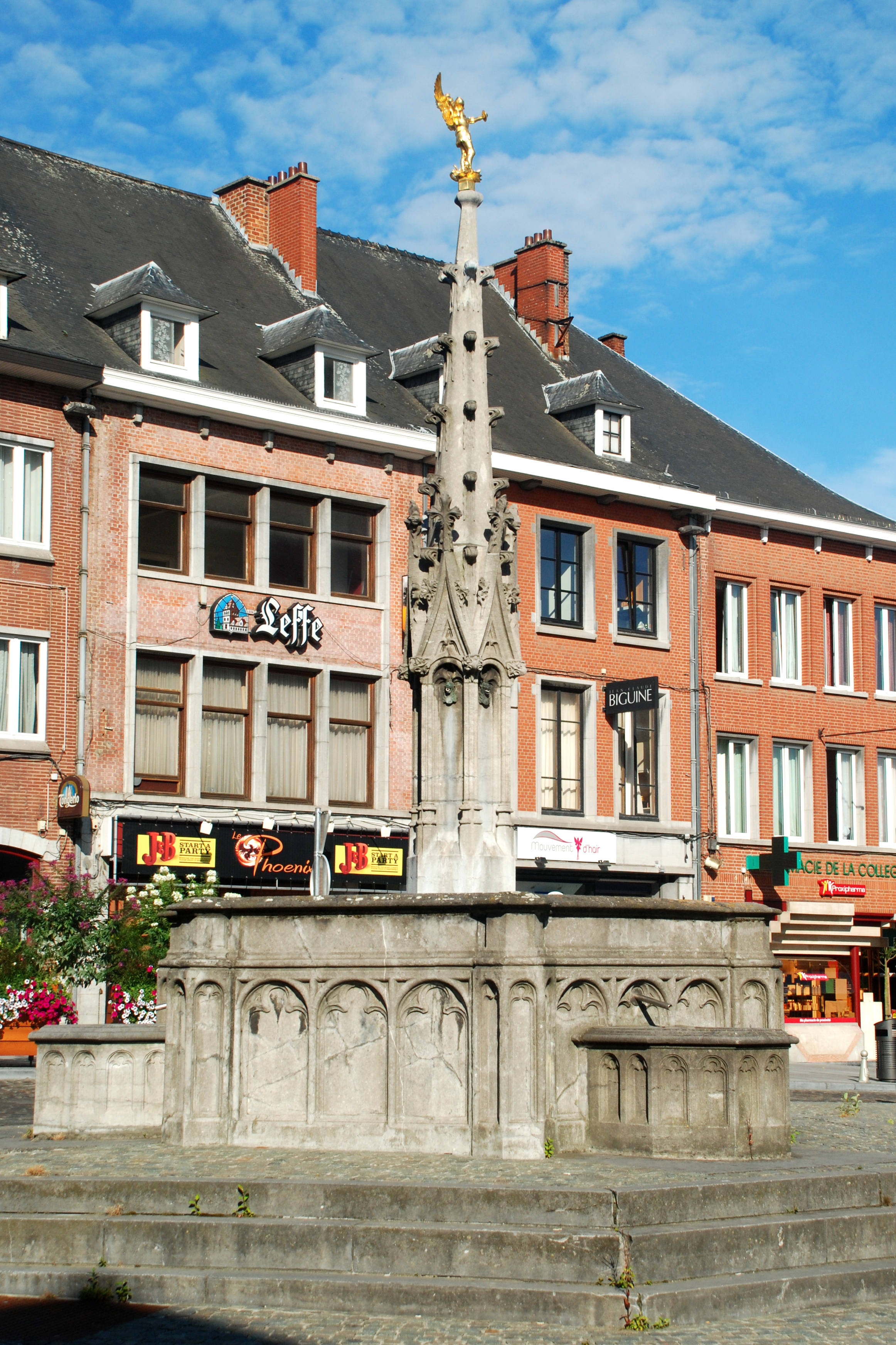 Belgique - Brabant wallon - Fontaine-perron de Nivelles